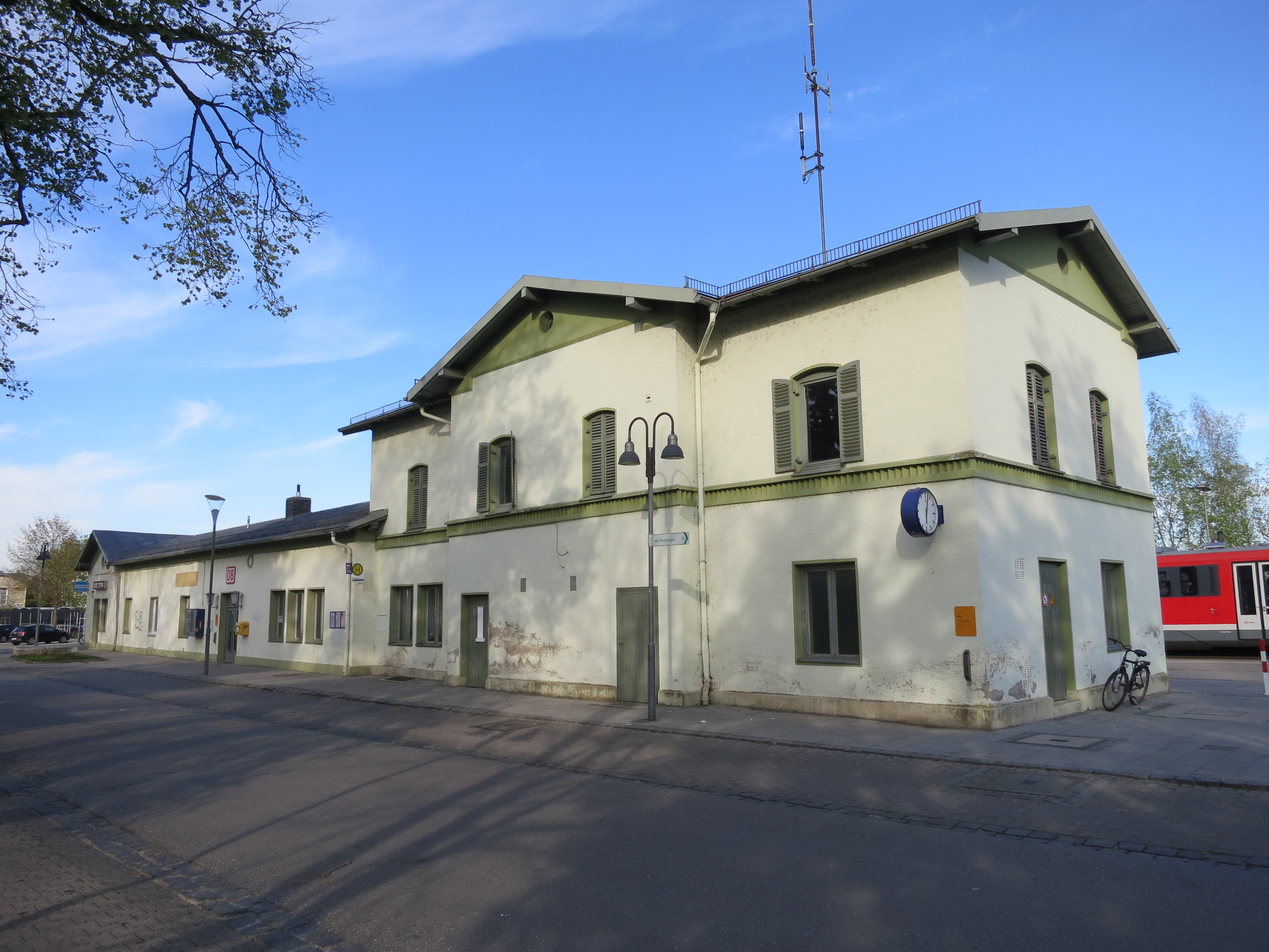 Empfangsgebäude des Bahnhofs Bobingen von der Straßenseite